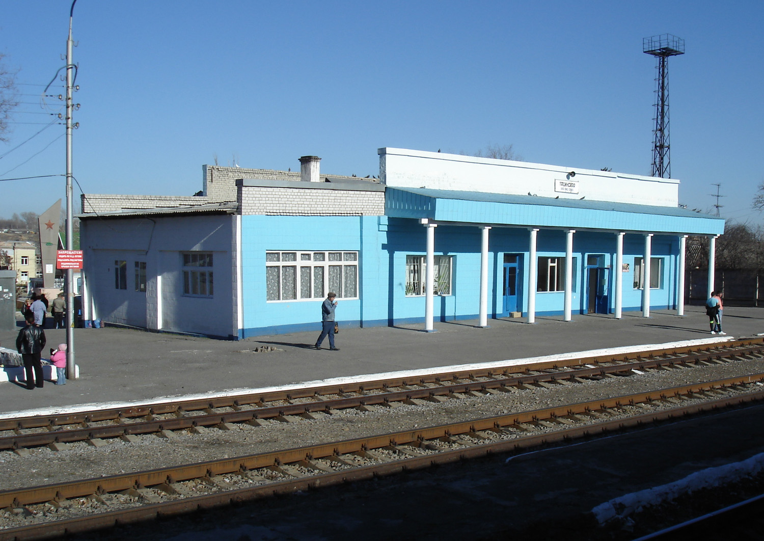 Станция Тацинская